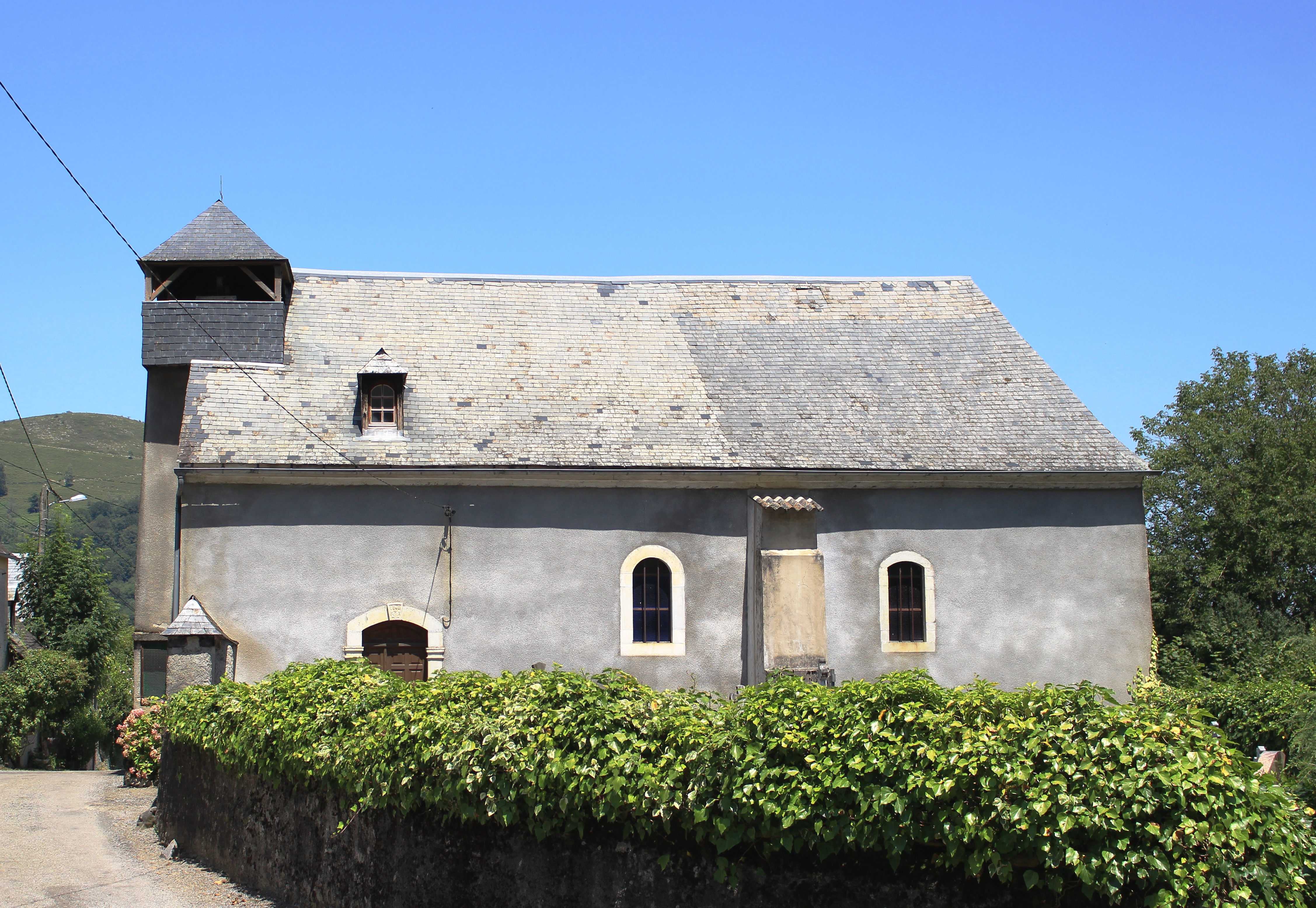 Église Saint-Blaise d'Arrodets (Hautes-Pyrénées)